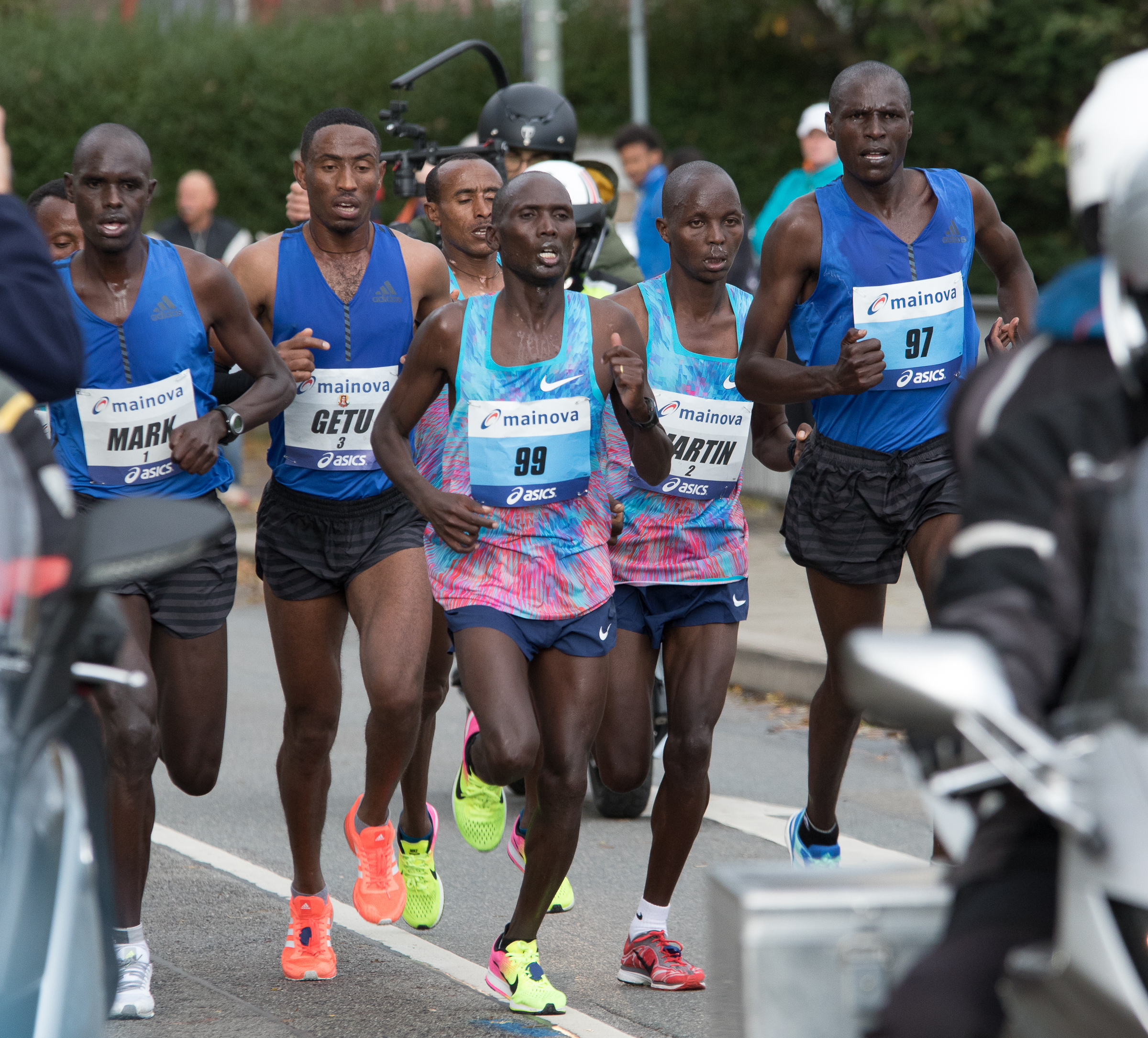 Martin Kiprugut Kosgey, Getu Feleke Zegeye, Mark Korir, Vincent Kipchumba (97), Vincent Kipsegechi Yator (99), Frankfurt Marathon 2017